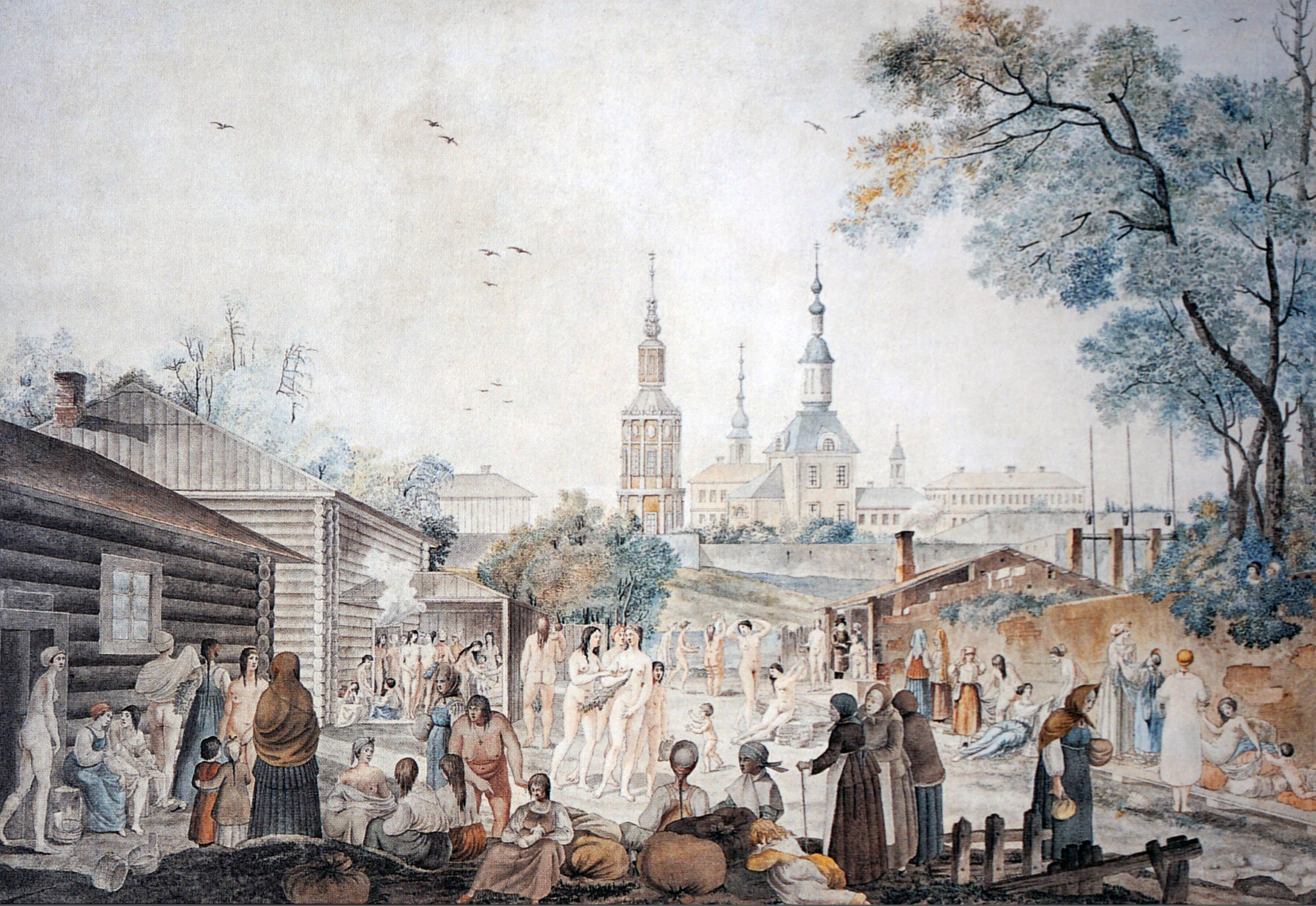 Делабарт Серебрянические бани в Москве